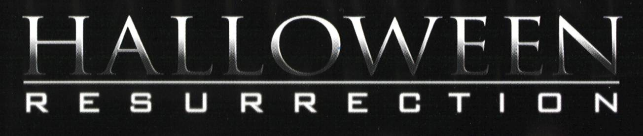 Halloween La Ressurrecion